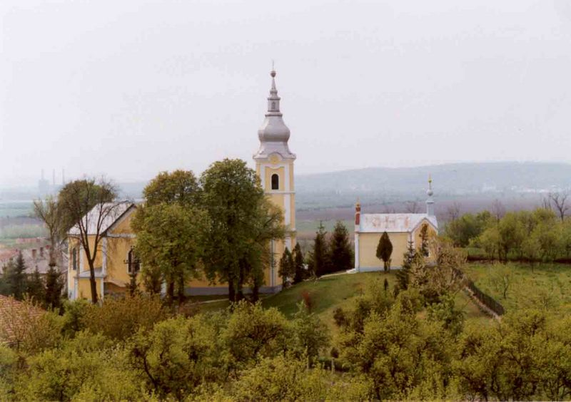 Templom távolról